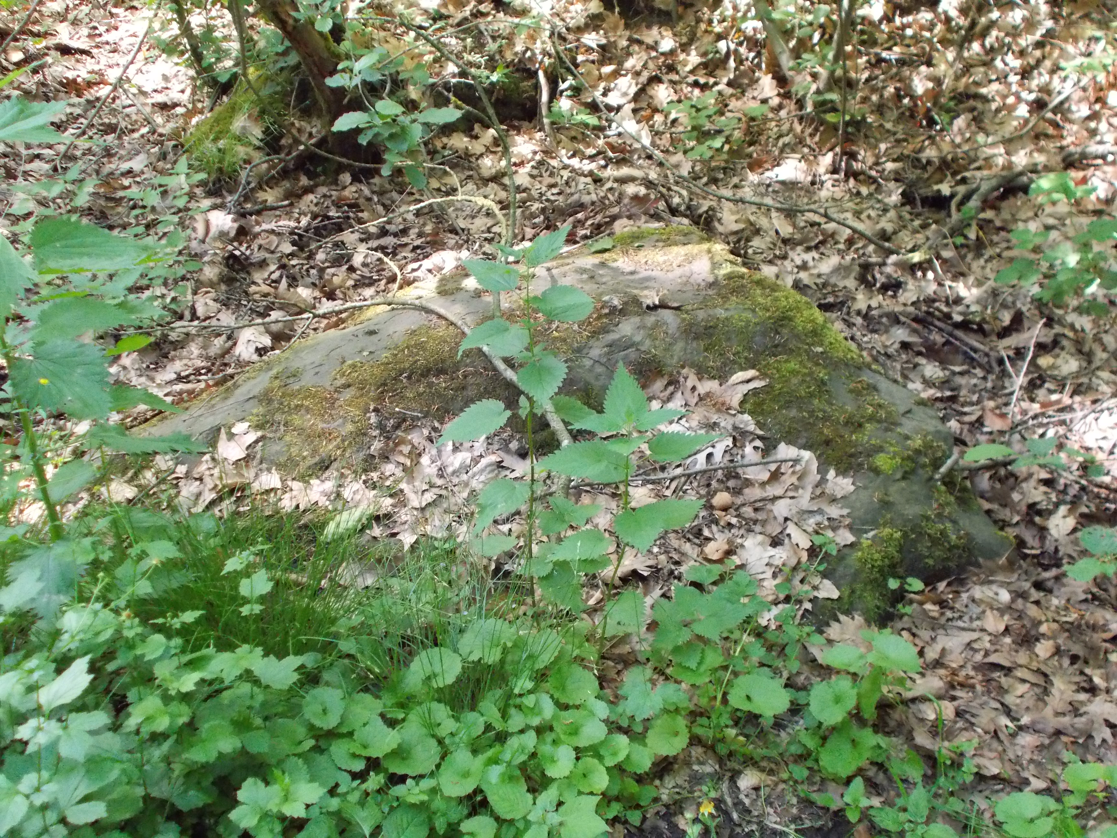 Naturdenkmal Teufelssteine am Teufelssteinweg im Hünxer Wald. ND 27, Versteckter Teufelsstein an der Wegkreuzung Knüppelweg / Teufelssteinweg.